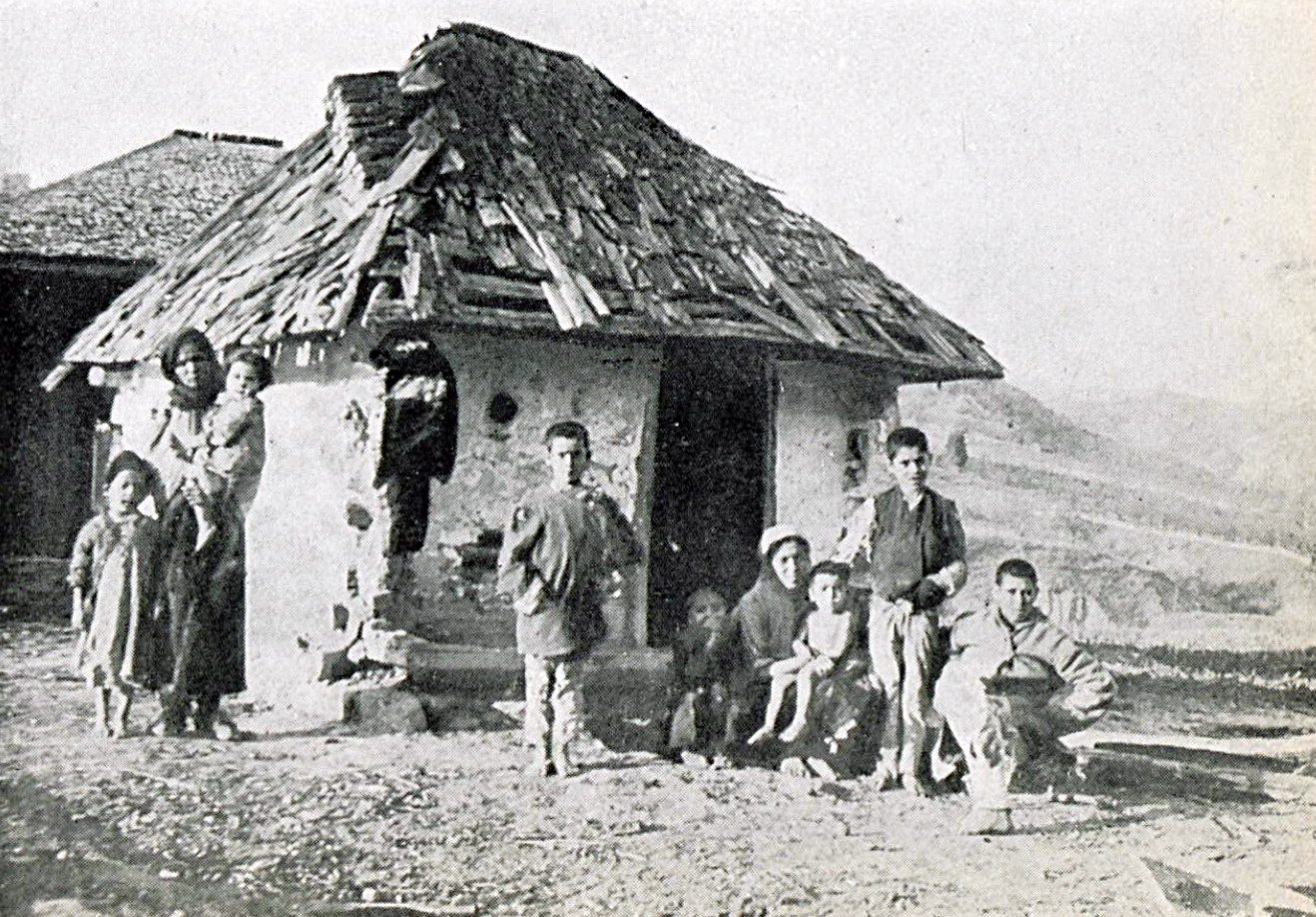 1916 - Album foto - Vrancea - salas de tigani din valea Siretului